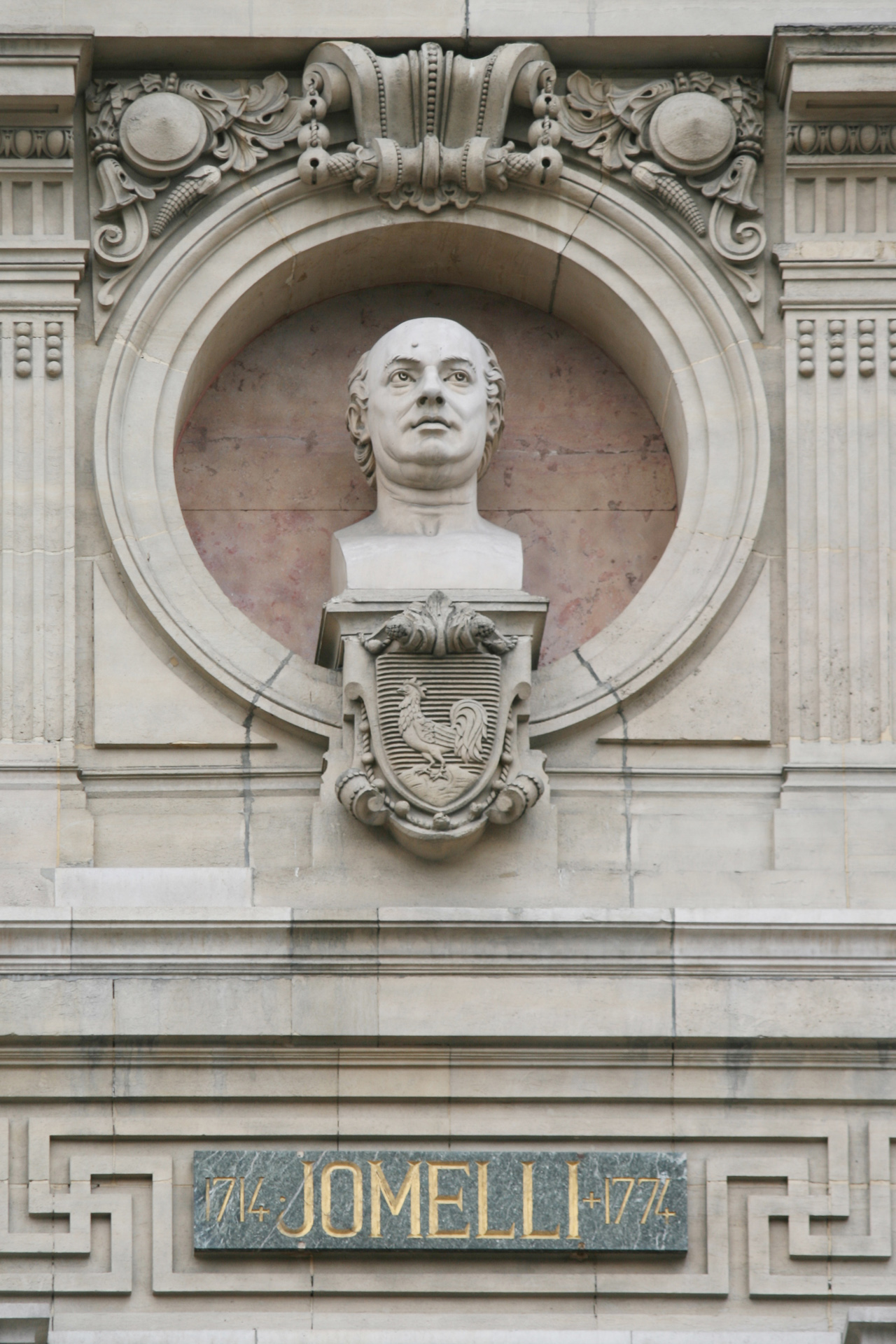 Statue de Niccolò Jommelli sur l'Opéra Garnier|opéra Garnier